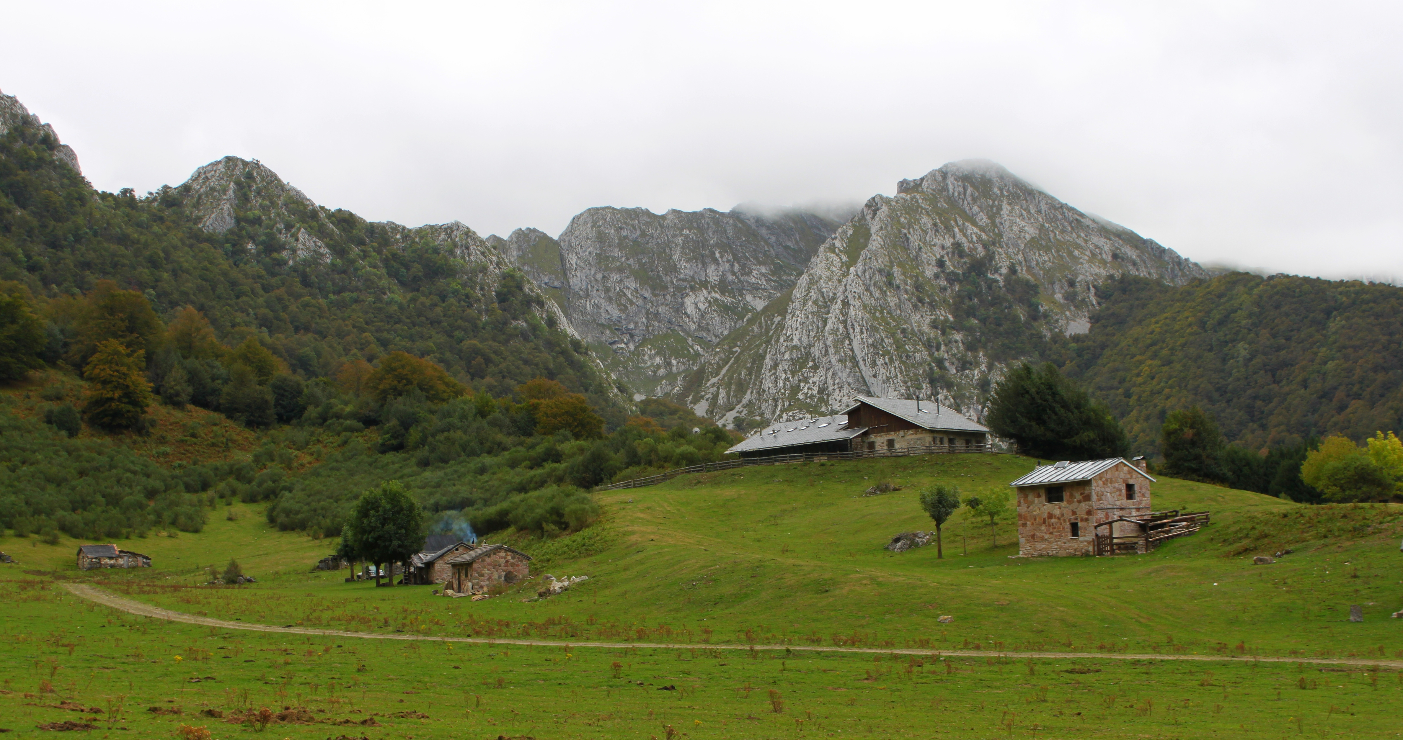 Vista general de la Vega Brañagallones con su típicas cabañas y el antiguo refugio de caza (actualmente reconvertido en albergue de montaña).